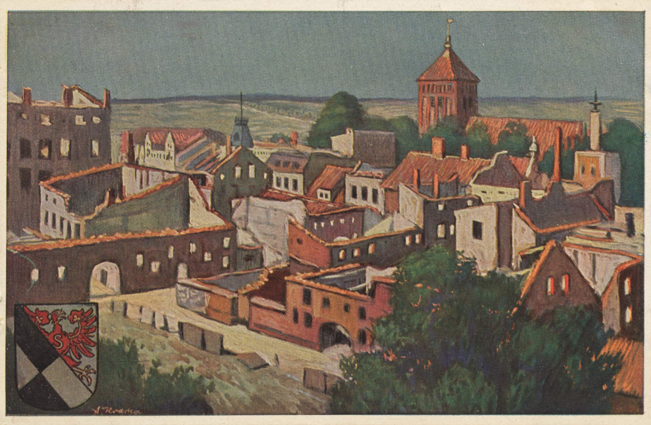 Ruinen mit der alten Kirche